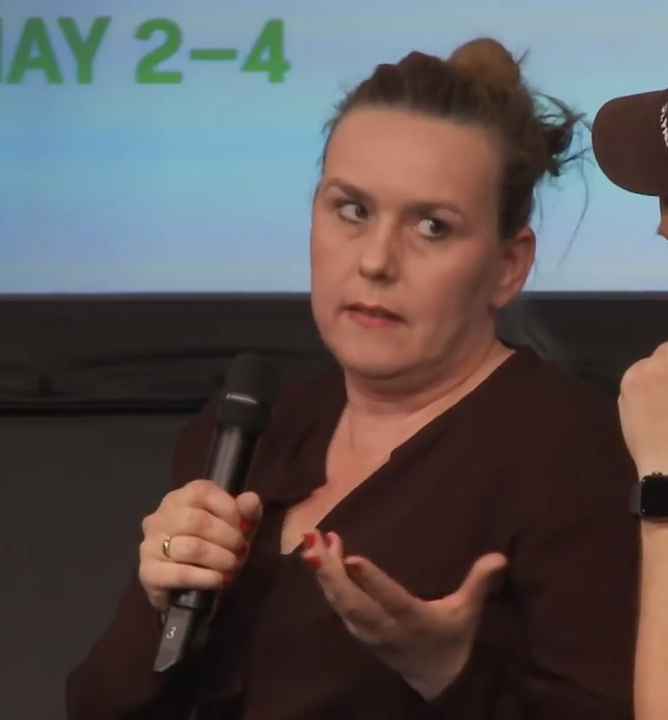 Since February 2017 Judith Simon holds the chair for Ethics in Information Technologies at the University of Hamburg.